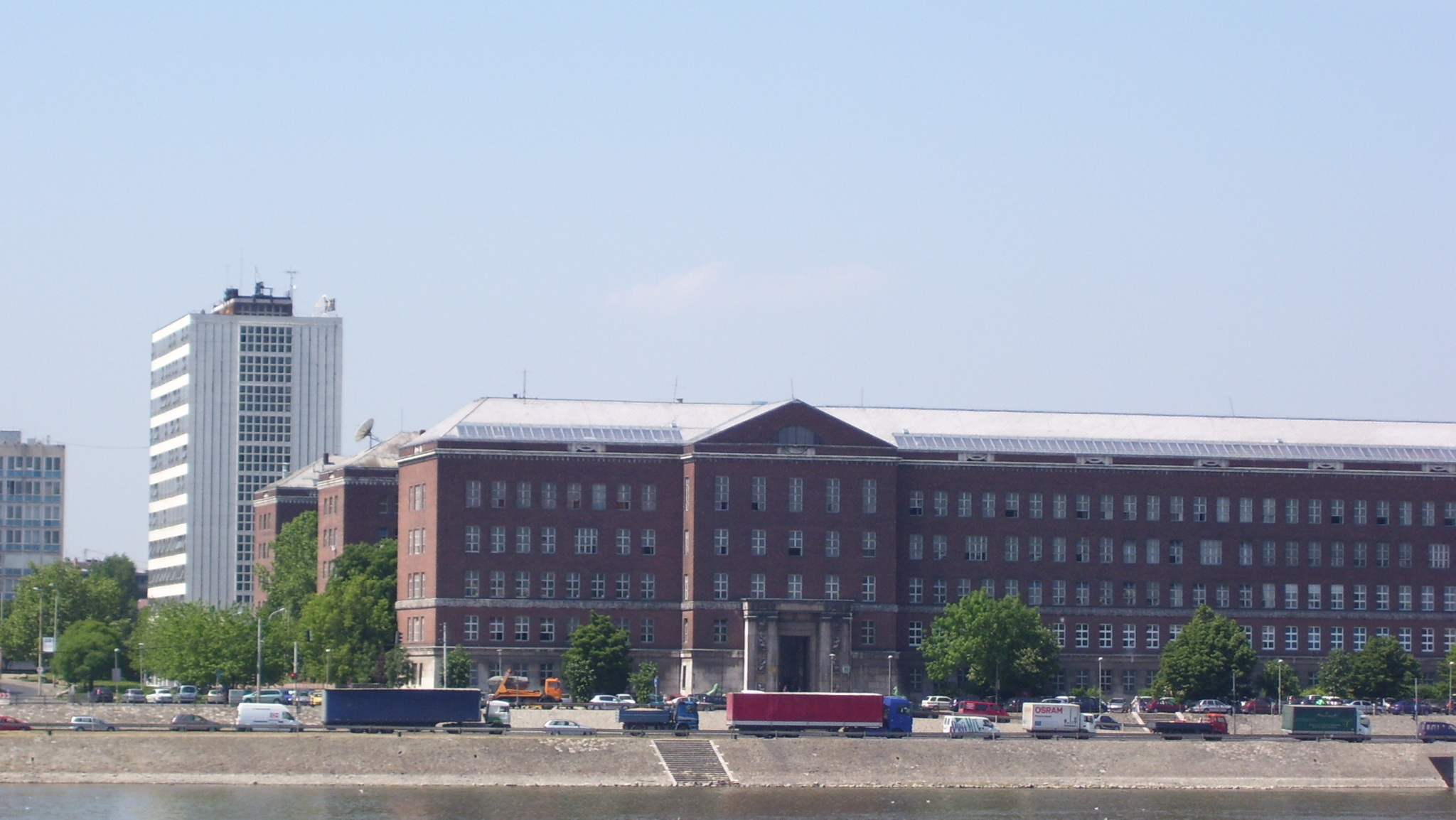 Budapesti Műszaki Egyetem R épülete, XI. Műegyetem rkp. 9. (tervezte idősebb Rimanóczy Gyula)